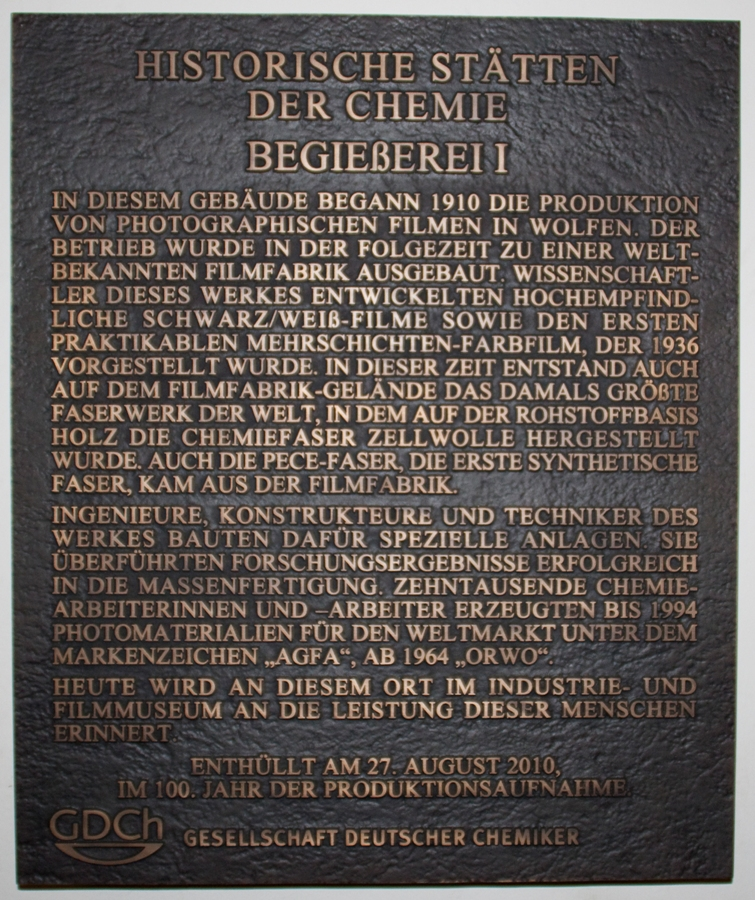 Gedenktafel Historische Stätten der Chemie im Industrie- und Filmmuseum Wolfen